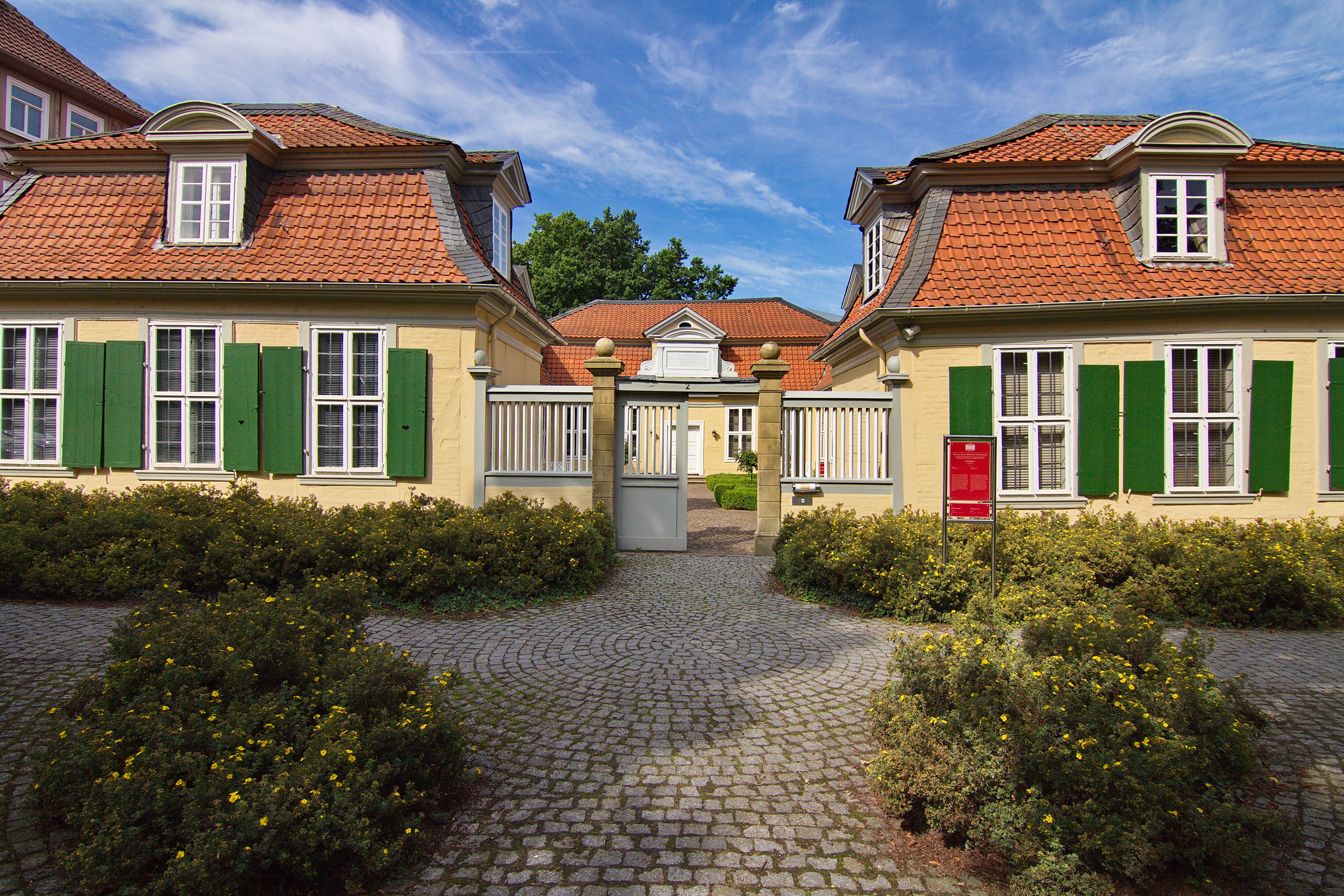 Das Hofbeamtenhaus von 1738 in Wolfenbüttel wurde von 1777 - 1781 von Gotthold Ephraim Lessing bewohnt.